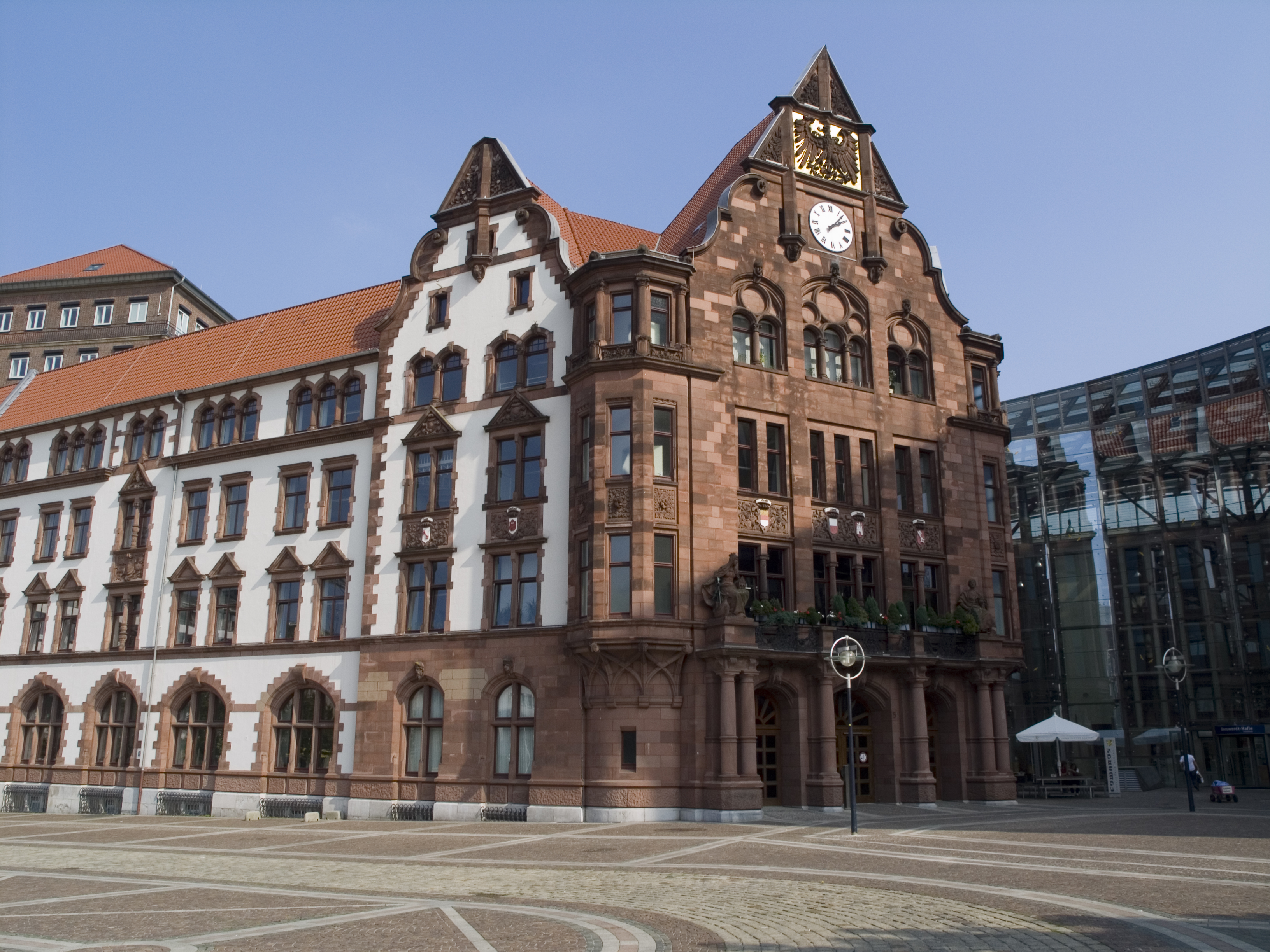 Северный Рейн - Вестфалия, Дортмунд - Старая ратуша